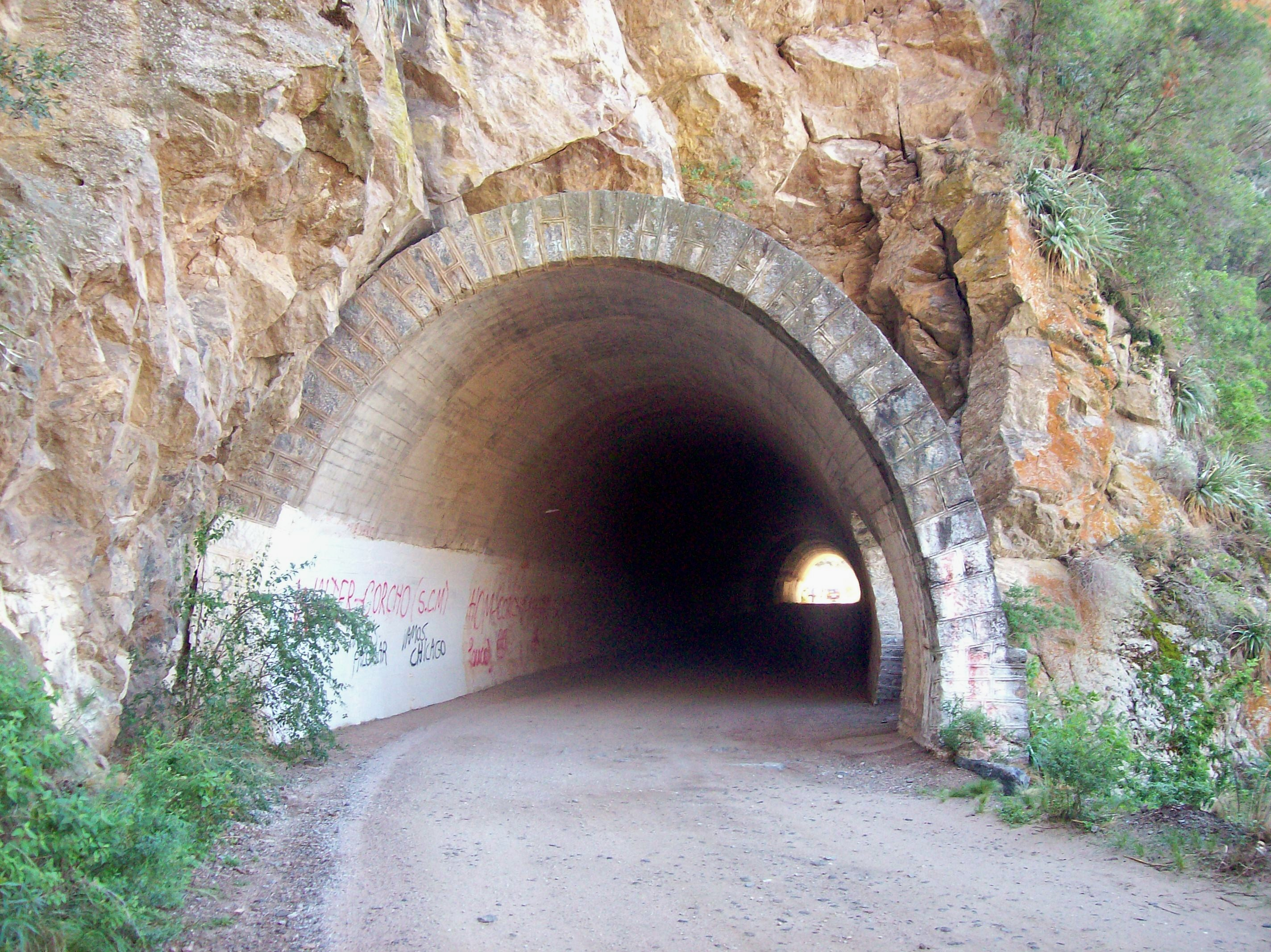 túnel en el "Camino de los Túneles", cerca del km 872 de la ruta provincial 28, Córdoba, Argentina.